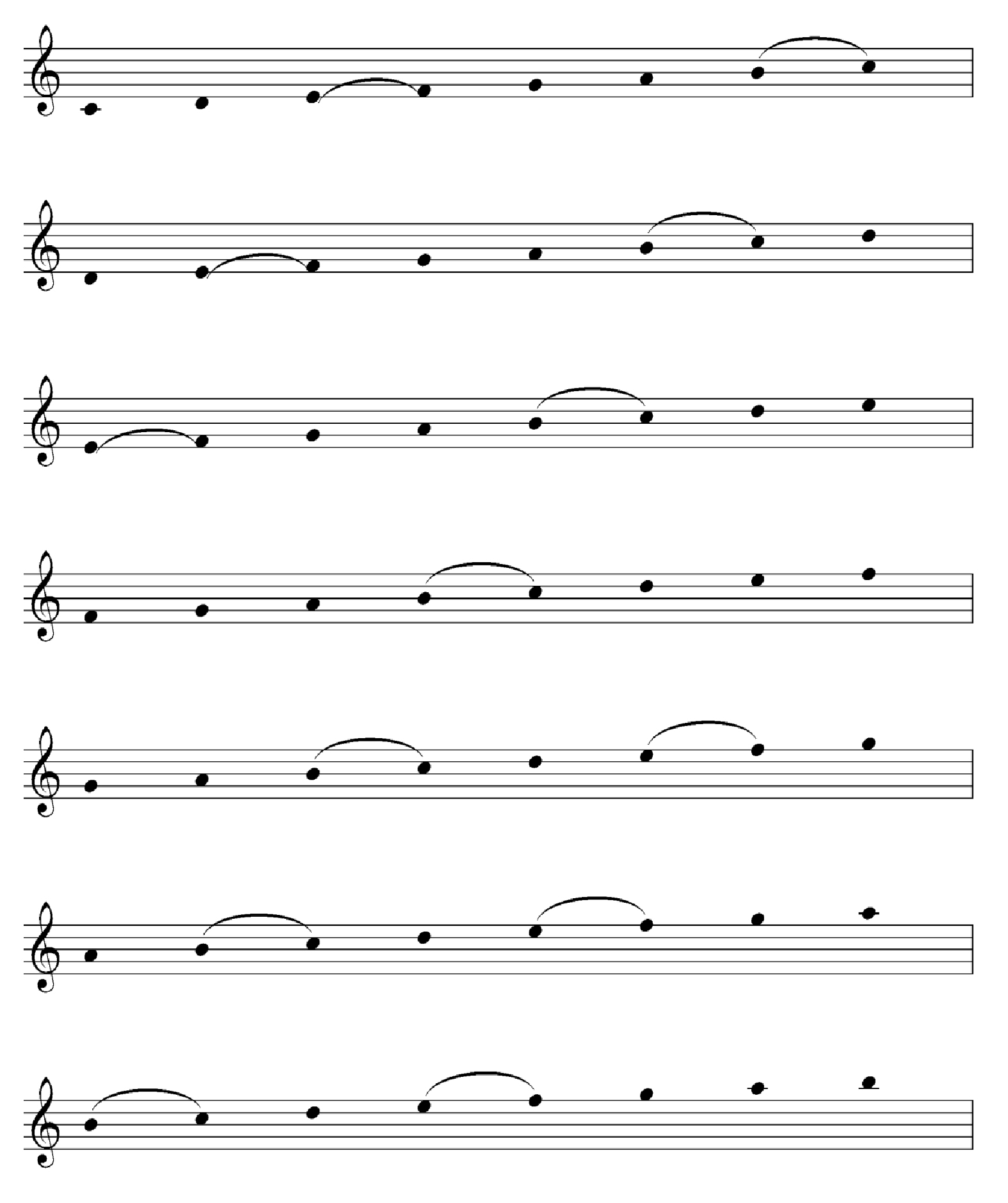 modos gregoriano